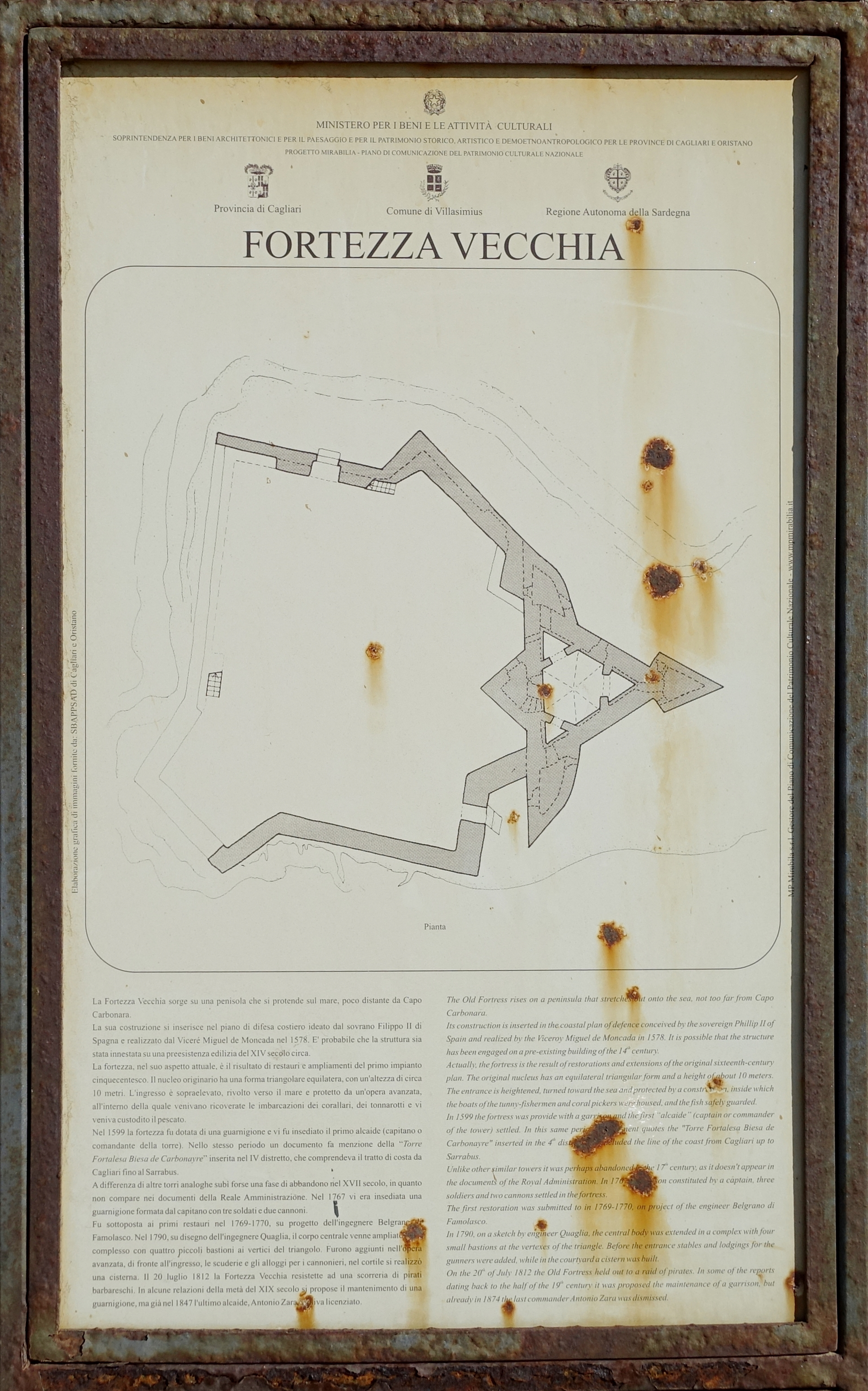 Informationstafel an der Fortezza Vecchia, Gemeinde Villasimius, Sardinien, Italien